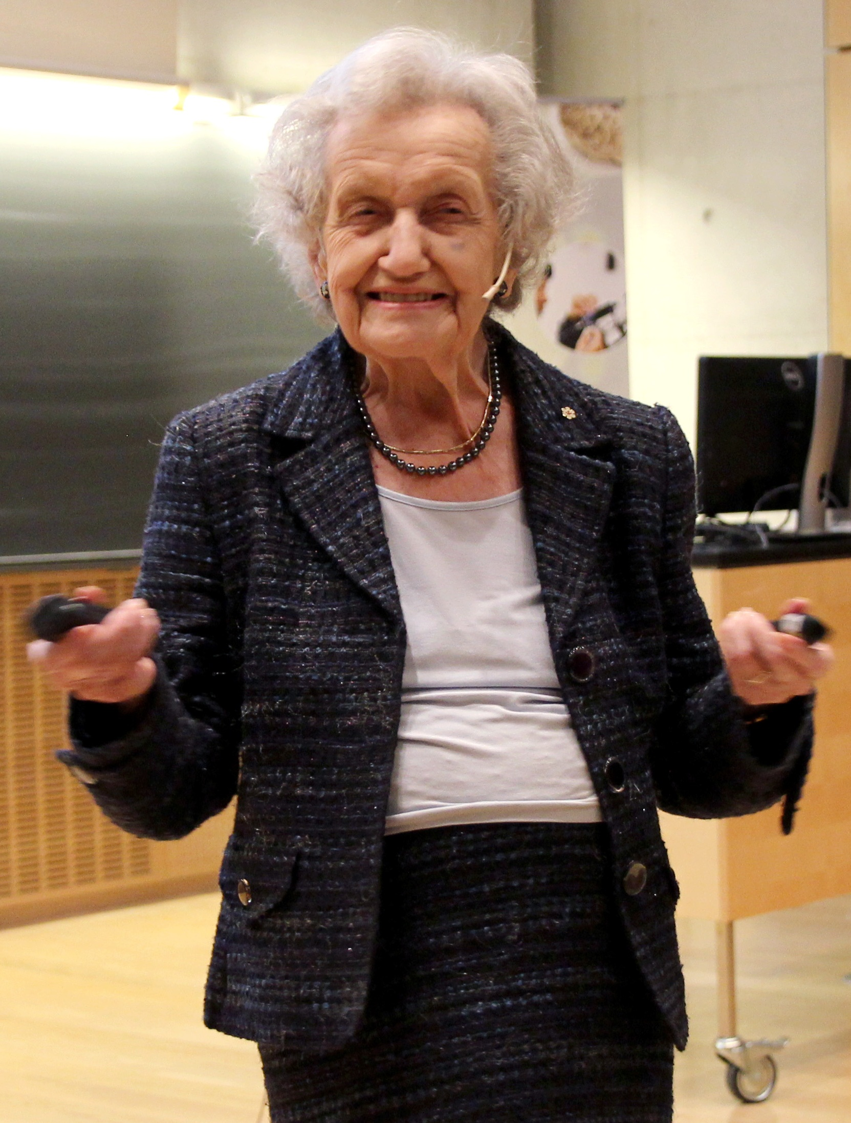 Brenda Milner, Neuroscience Prize Winner